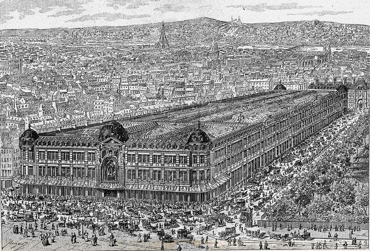 Gravure fin XIXe siècle représentant le grand magasin parisien achevé en 1887.